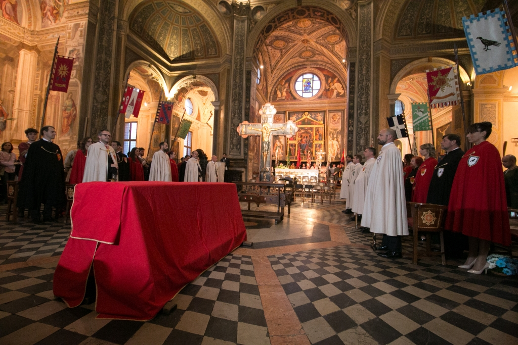 Veglia della croce della croce di Arimberto di Intimiano - Palio di Legnano 2016